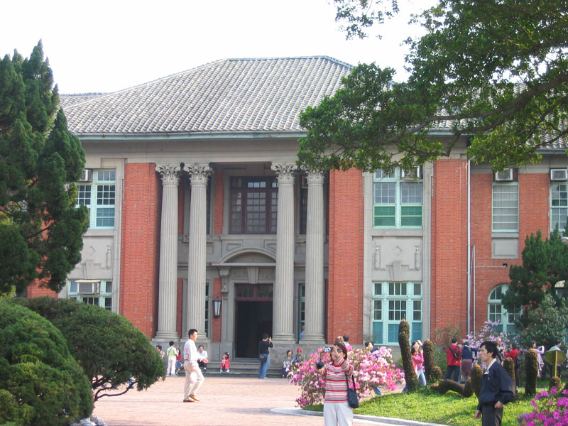 中文（台灣）: 台灣大學行政大樓（市定古蹟）Bân-lâm-gú: Tâi-uân Tāi-ha̍k hîng-tsìng tuā-lâu (tshī-tīng kóo-tsik).